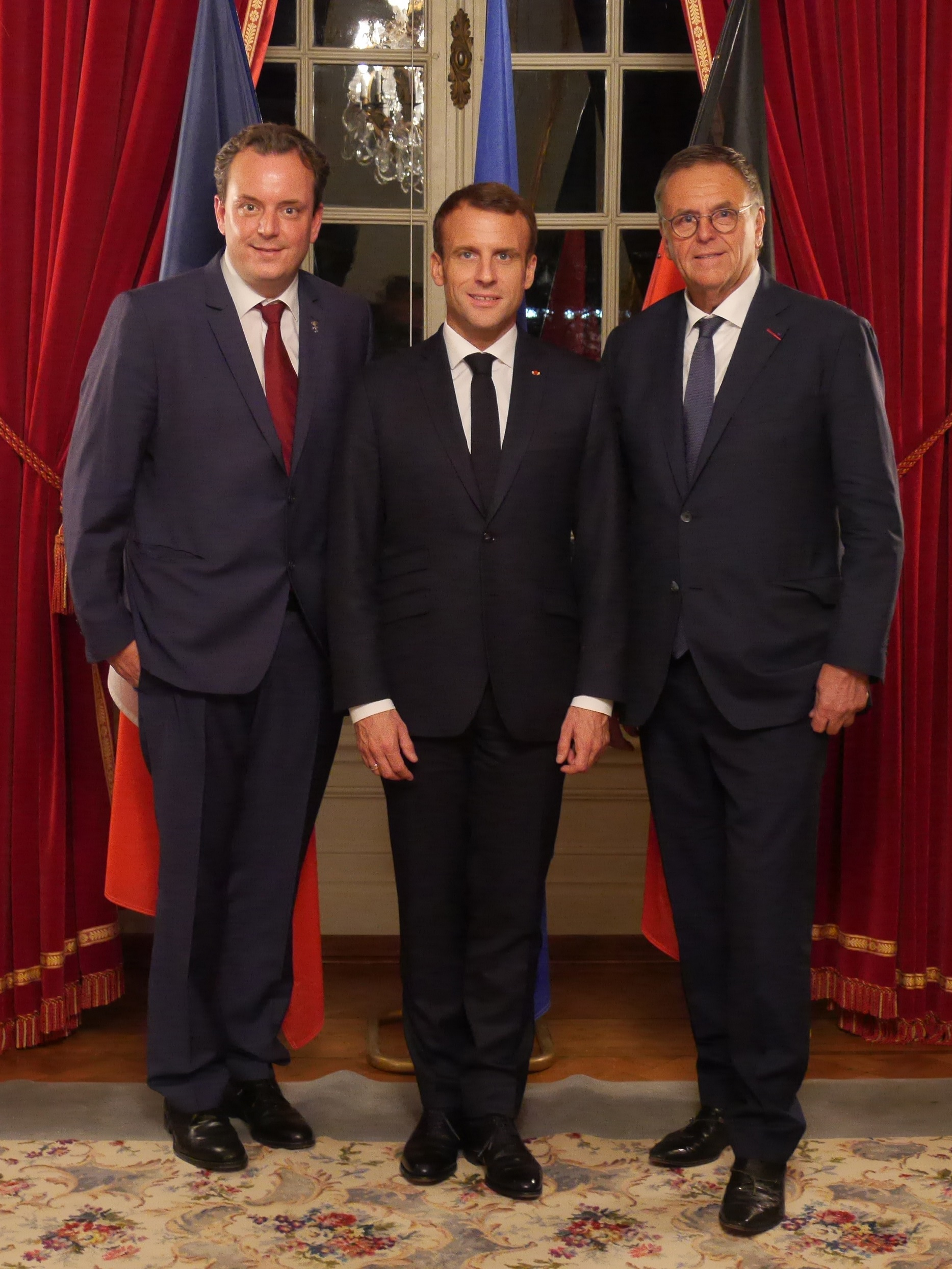 Emmanuel Macron (Mitte) zeigt sich begeistert von der Vision von Michael (links) und Roland Mack